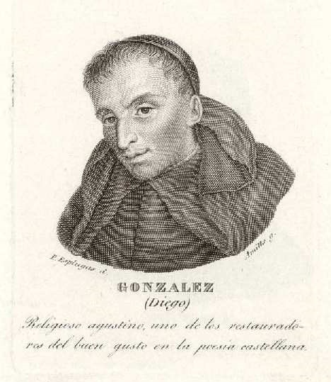 Fray Diego Tadeo González, grabado al aguafuerte y buril de Juan Amills por dibujo de P. Esplugas, Inscripción: "GONZALEZ (Diego.) Religioso agustino, uno de los restauradores del buen gusto en la poesía castellana". Biblioteca Nacional de España.